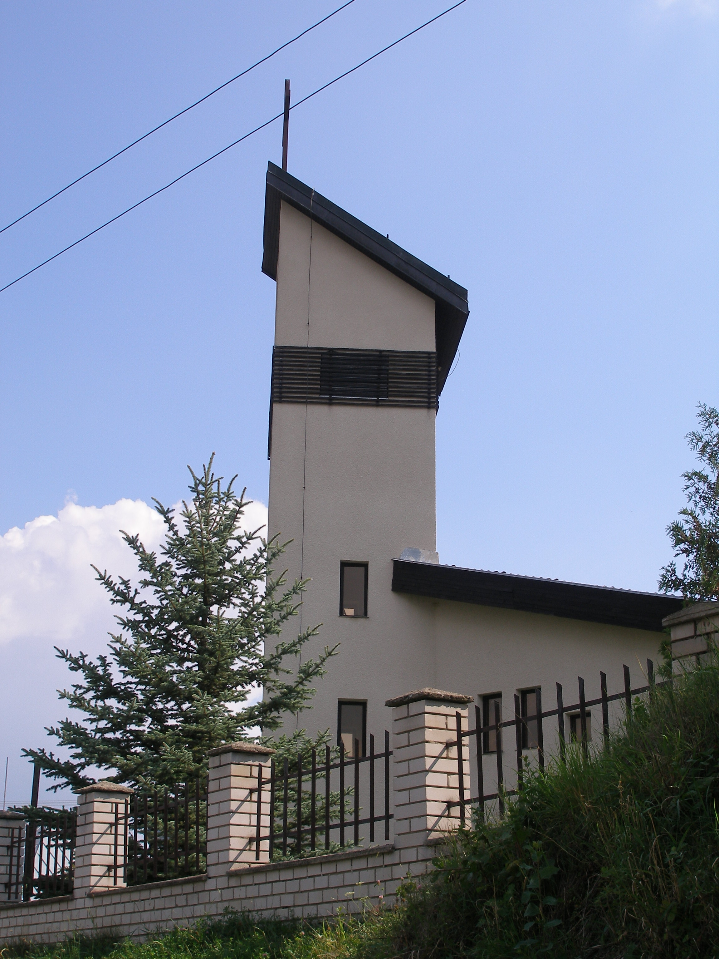 Šarišská obec Ondrašovce